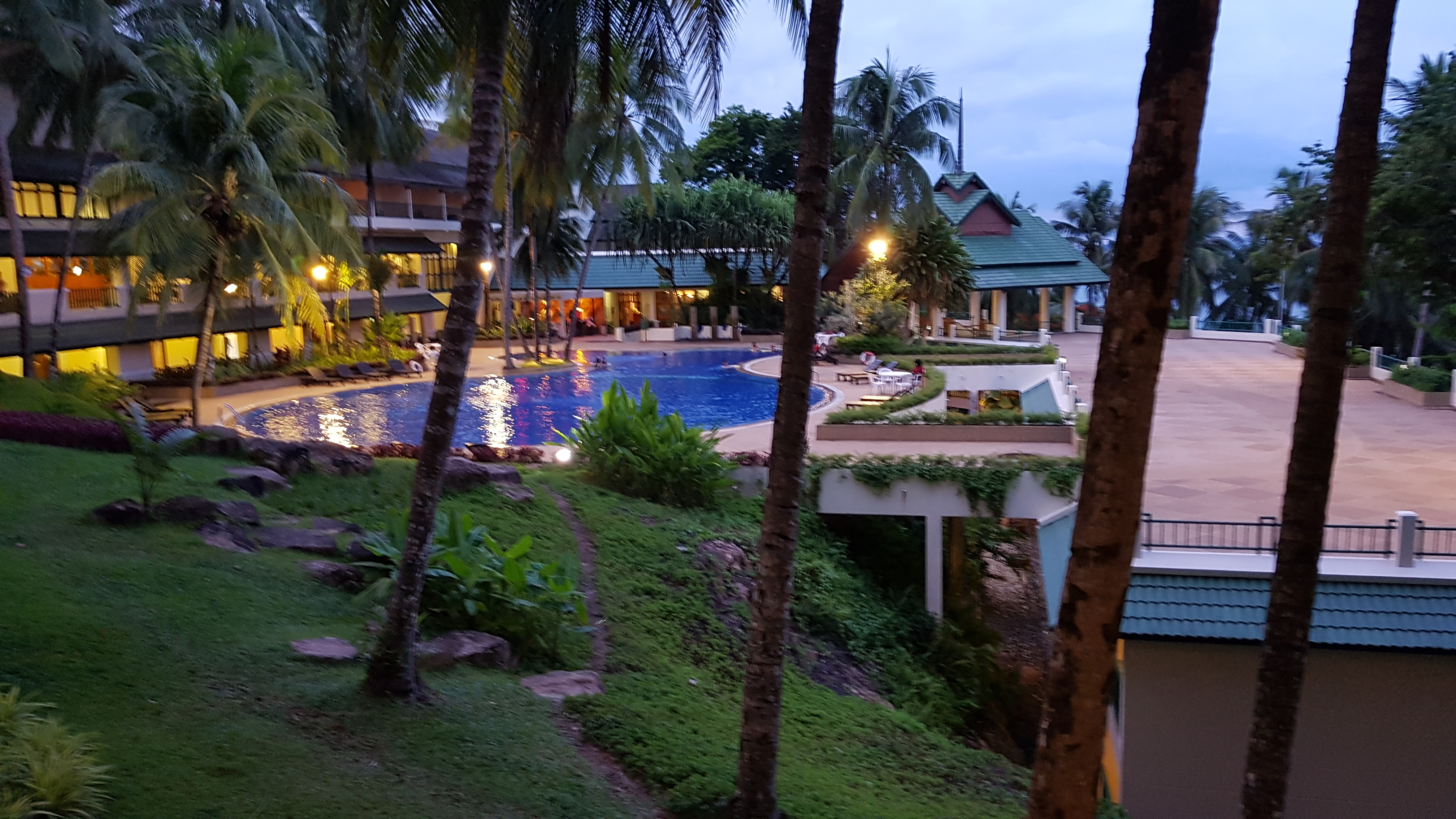 သူ​ဌေးကျွန်း